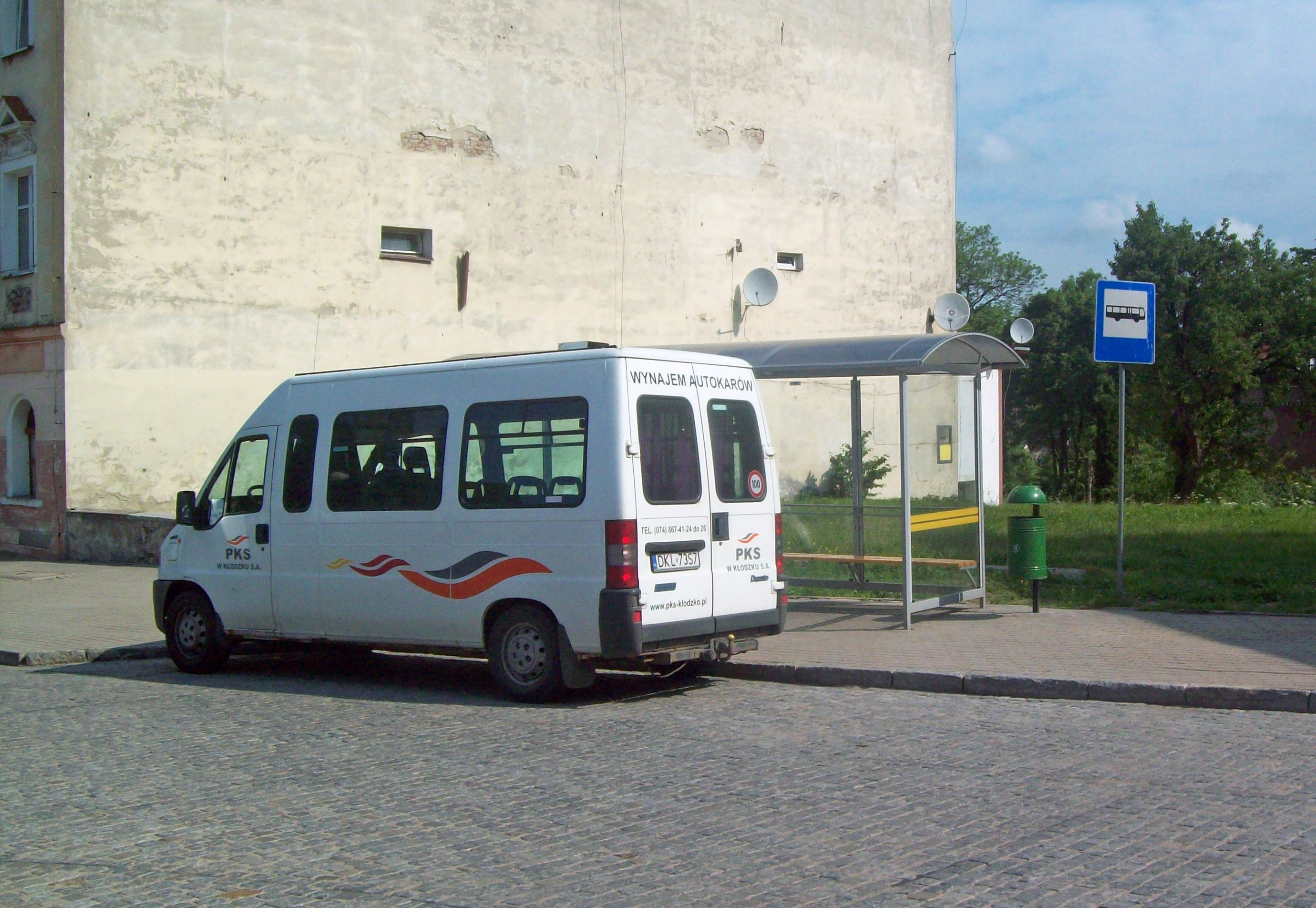 Przystanek autobusowy w Międzylesiu